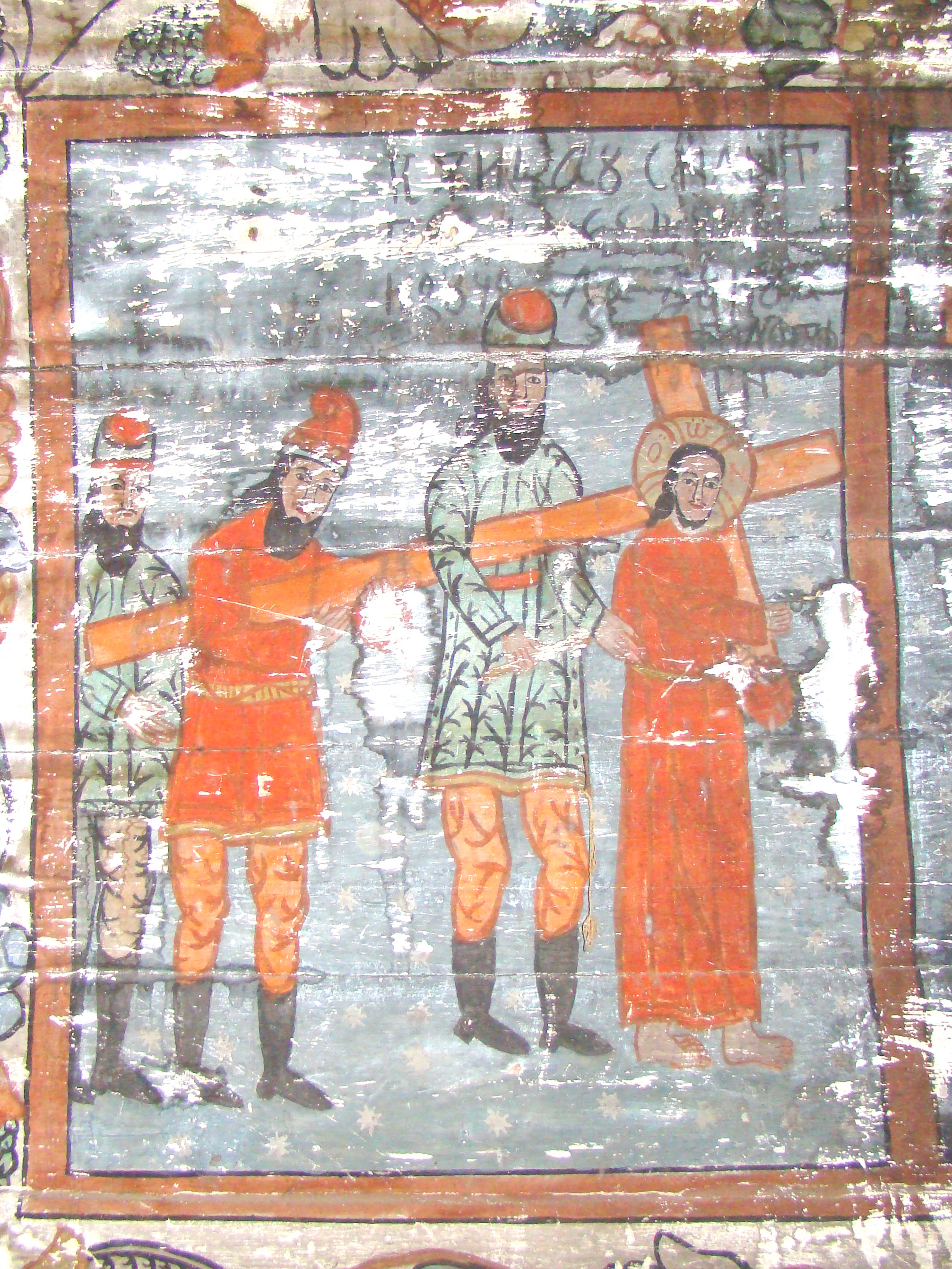 Biserica de lemn „Sf.Dumitru” din Larga, județul Maramureș